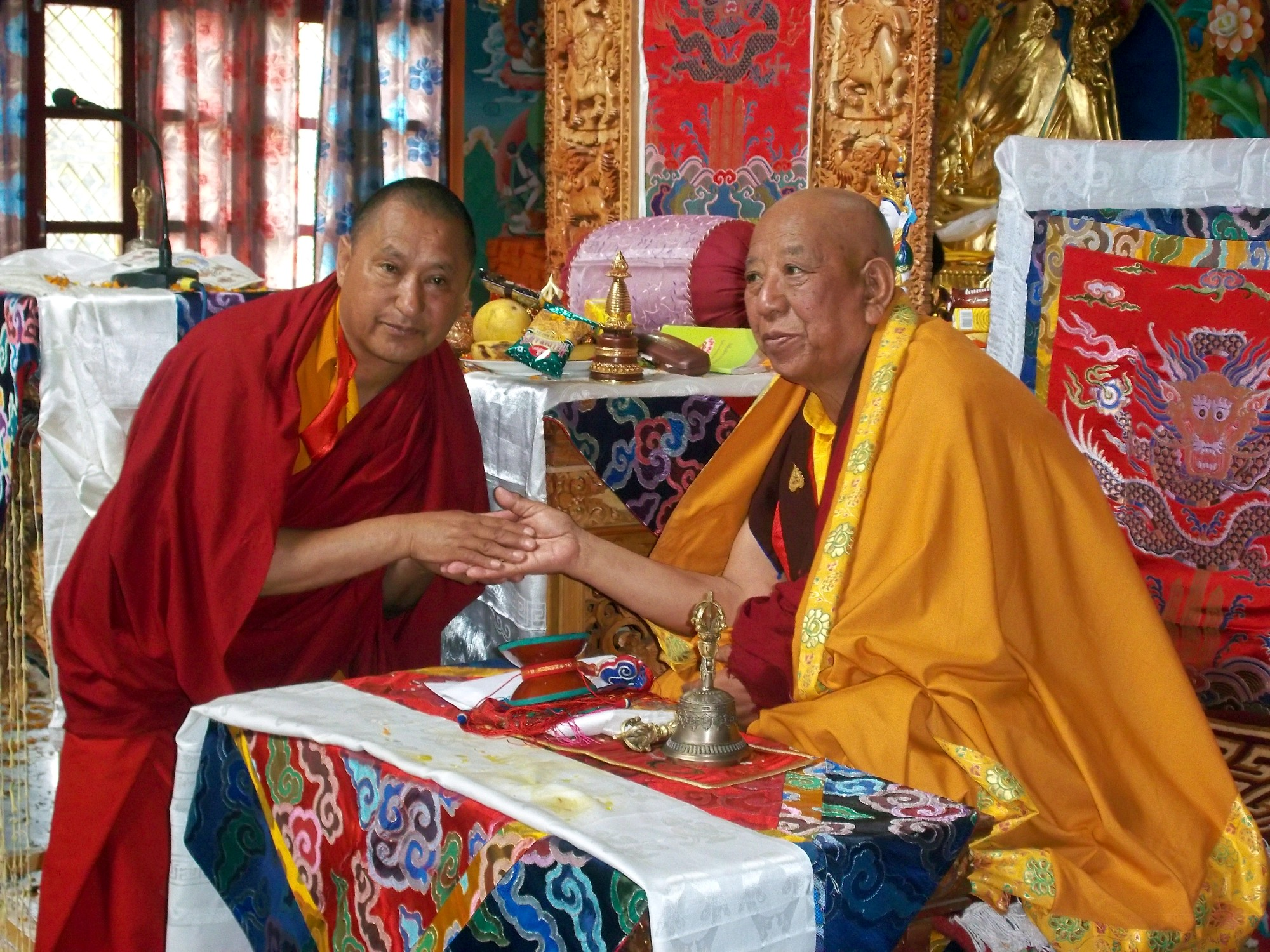 Ven Tharchin Rinpoché et Son Eminence Togden Rinpoché